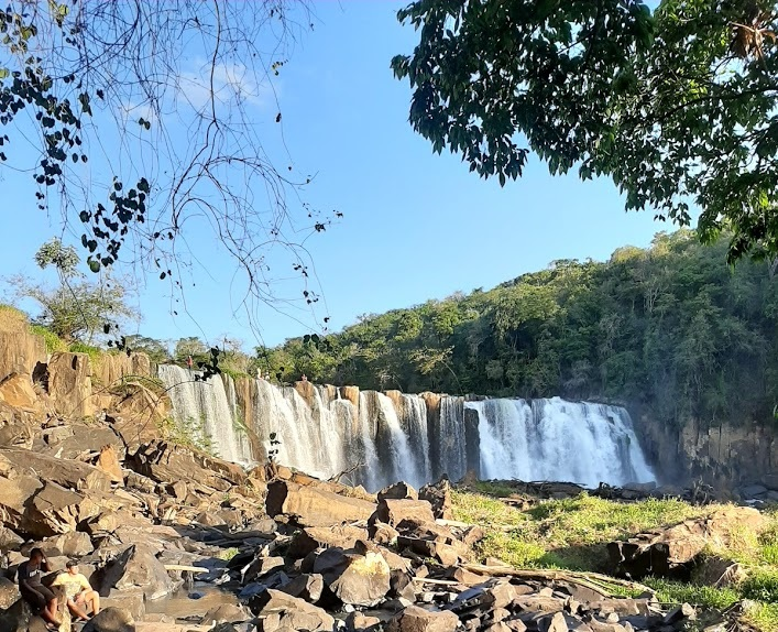 Salto Cavalcanti no Rio das Cinzas. Município de Tomazina- Estado do Paraná - Brasil